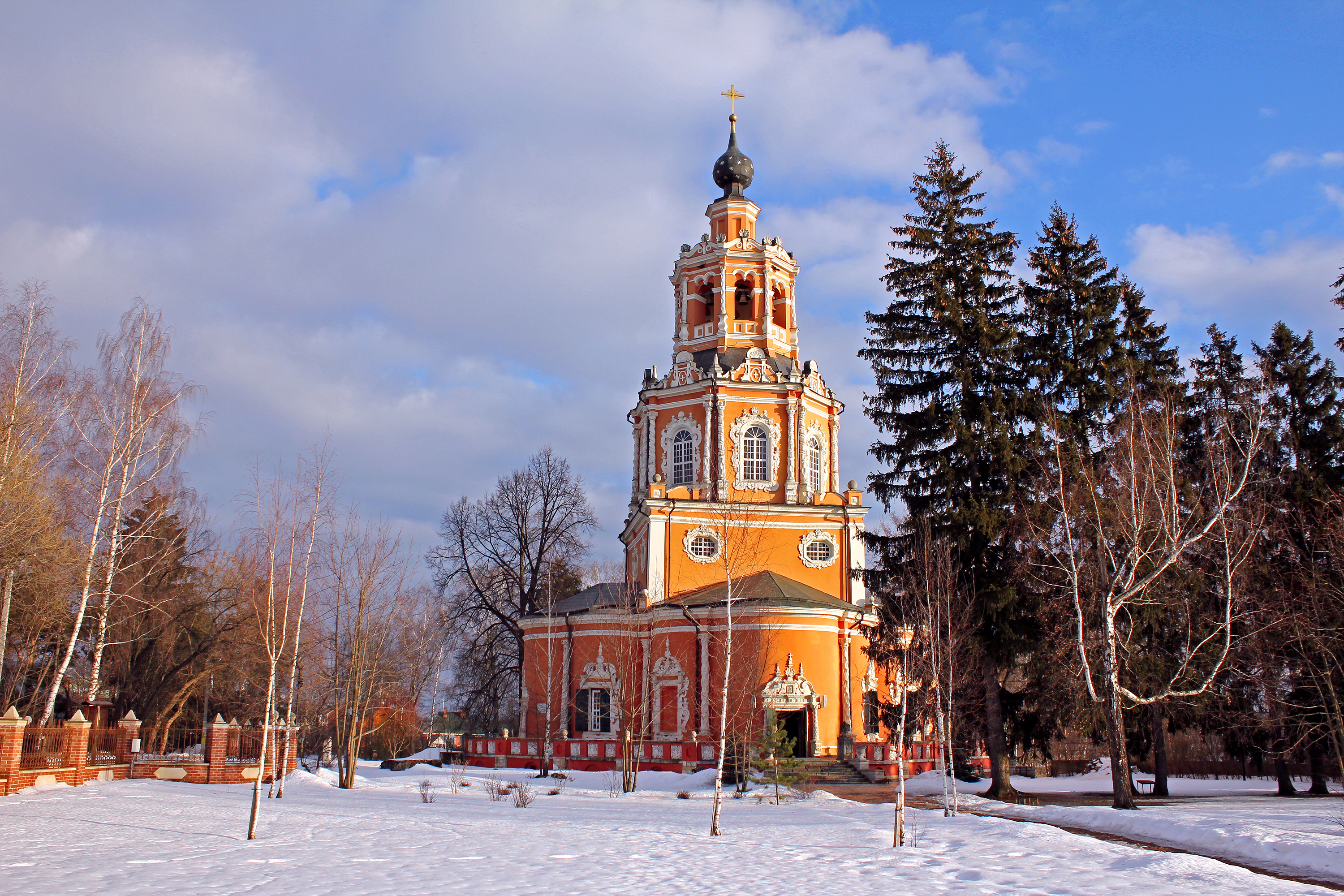 Церковь Спаса Нерукотворного Образа: Уборы, Одинцовский район, Московская область